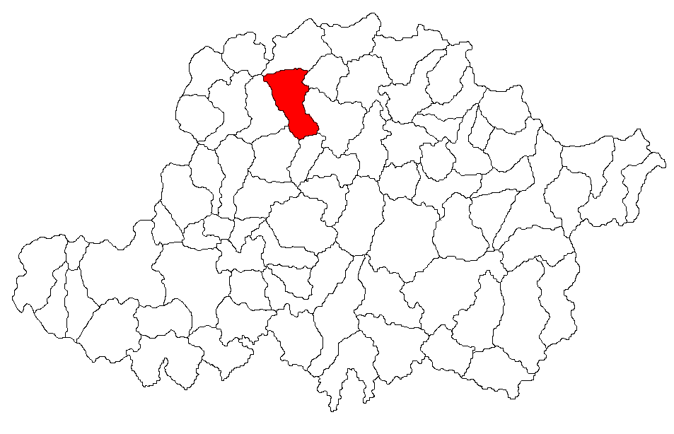 Categorie:Hărţi ale judeţului Arad